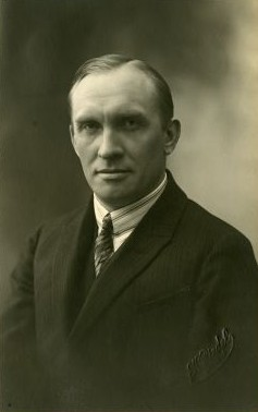 Ernst Saareste, eesti arstiteadlane